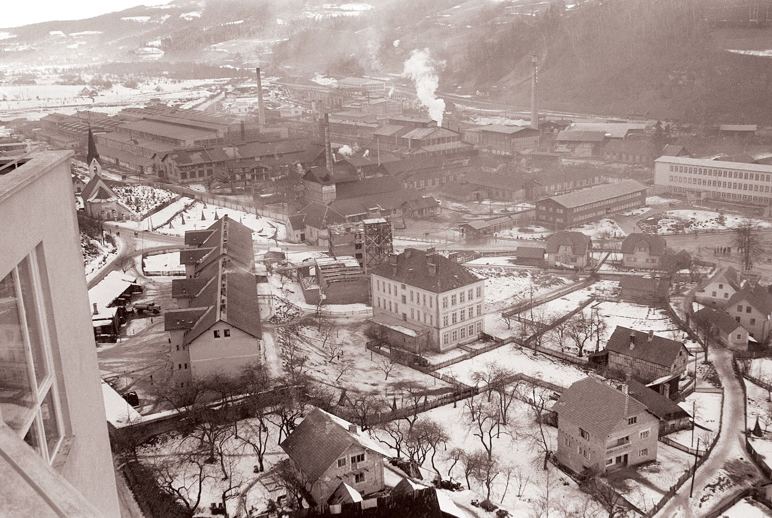 Panoramski posnetek Raven na Koroškem